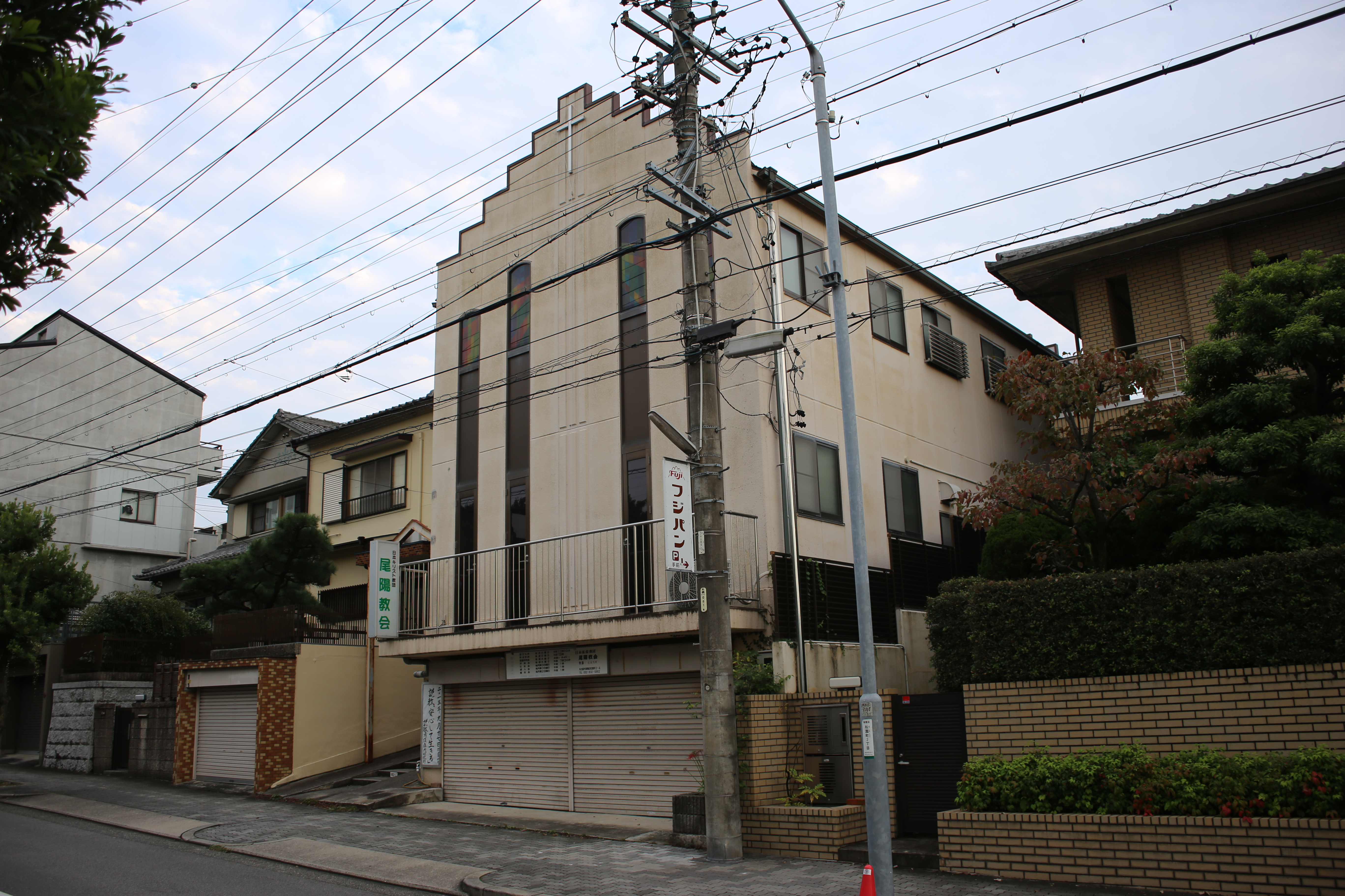 名古屋市瑞穂区松園町の日本基督教団尾陽教会を北側公道西側より撮影